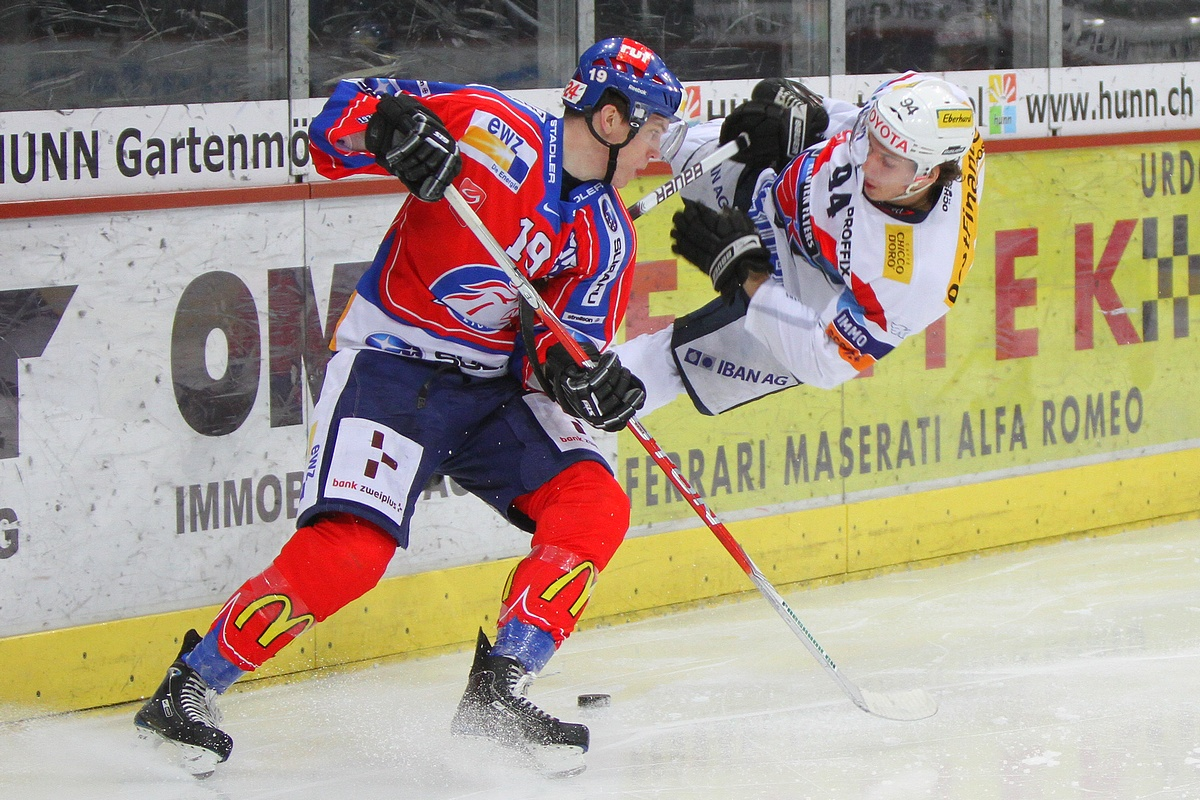 Reto Schäppi (à gauche) des ZSC Lions, Samuel Walser (à droite), des Kloten Flyers